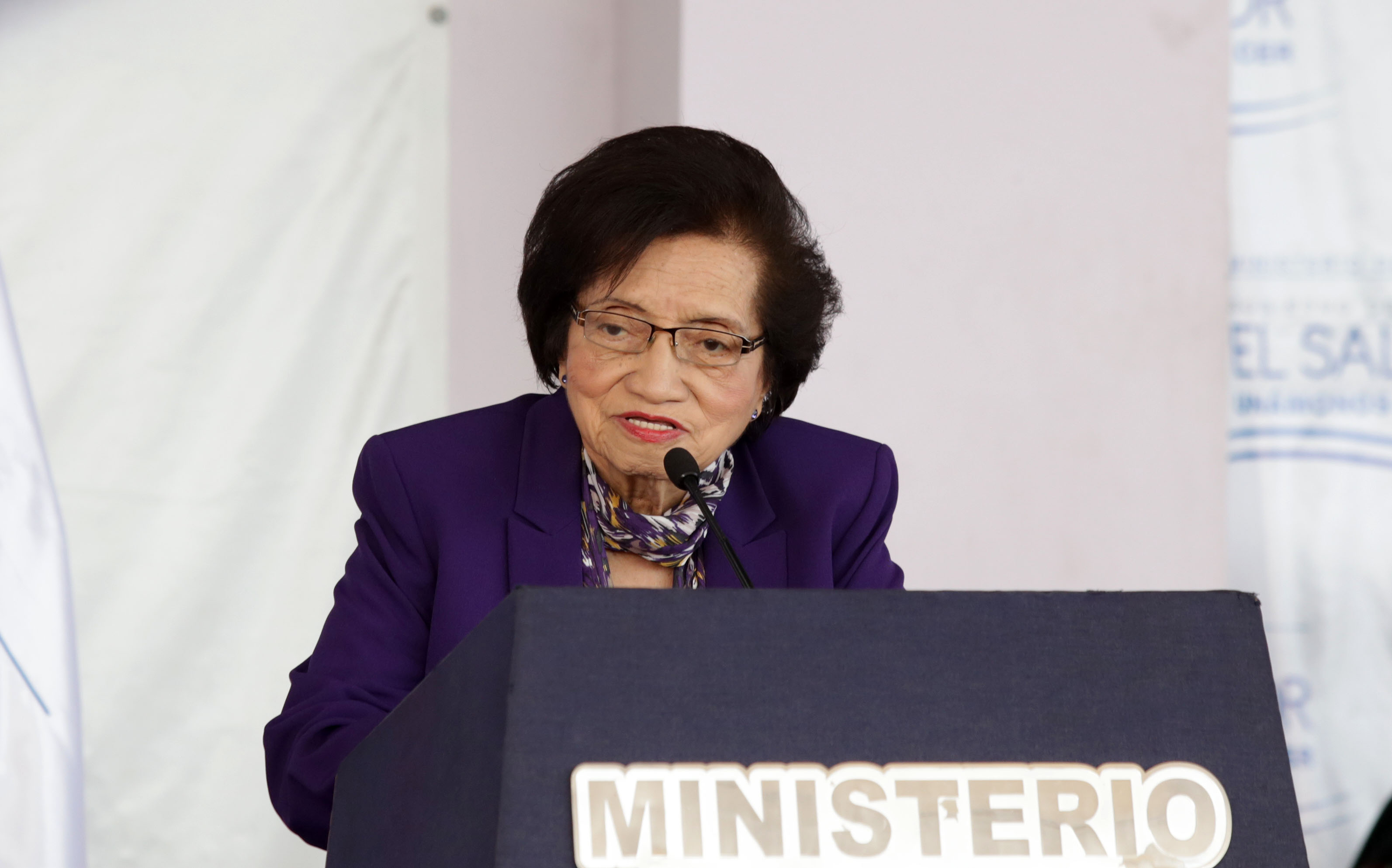 Acto Nominación del Hospital Nacional de la Mujer "Dra. María Isabel Rodríguez".